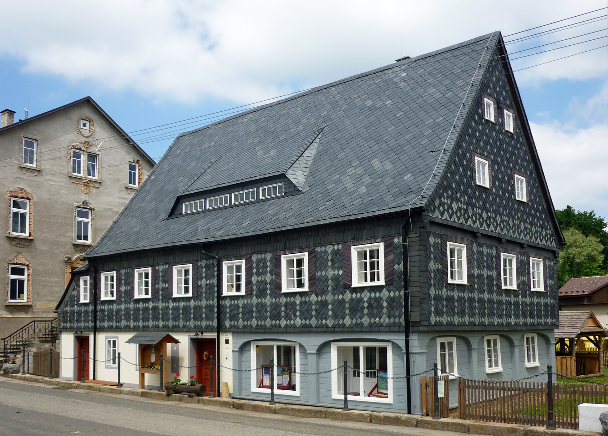 Umgebindehaus Nr. 424 in Hainspach (Lipová) in Nordböhmen